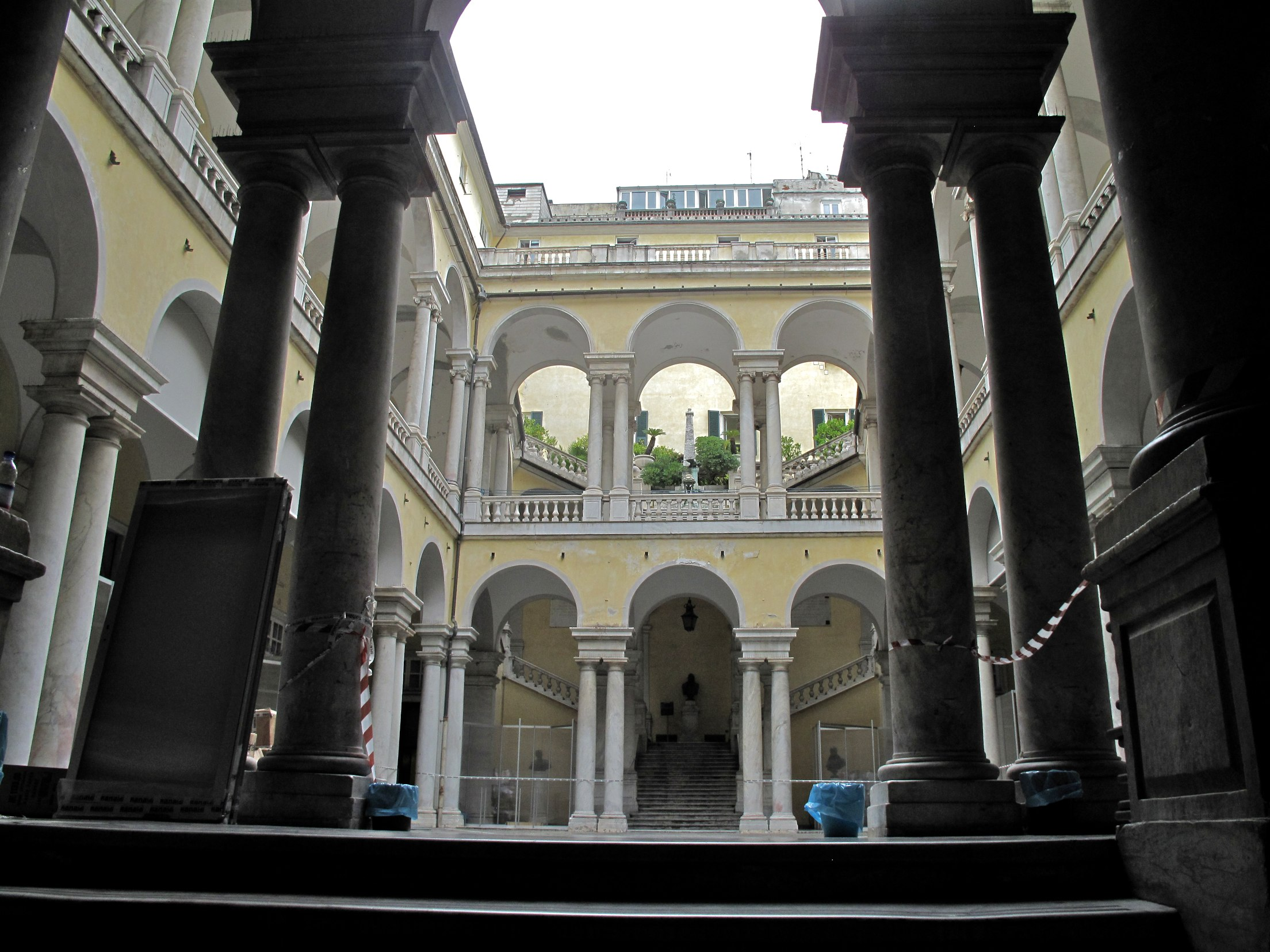 Vacances juillet 2011 en Ligurie